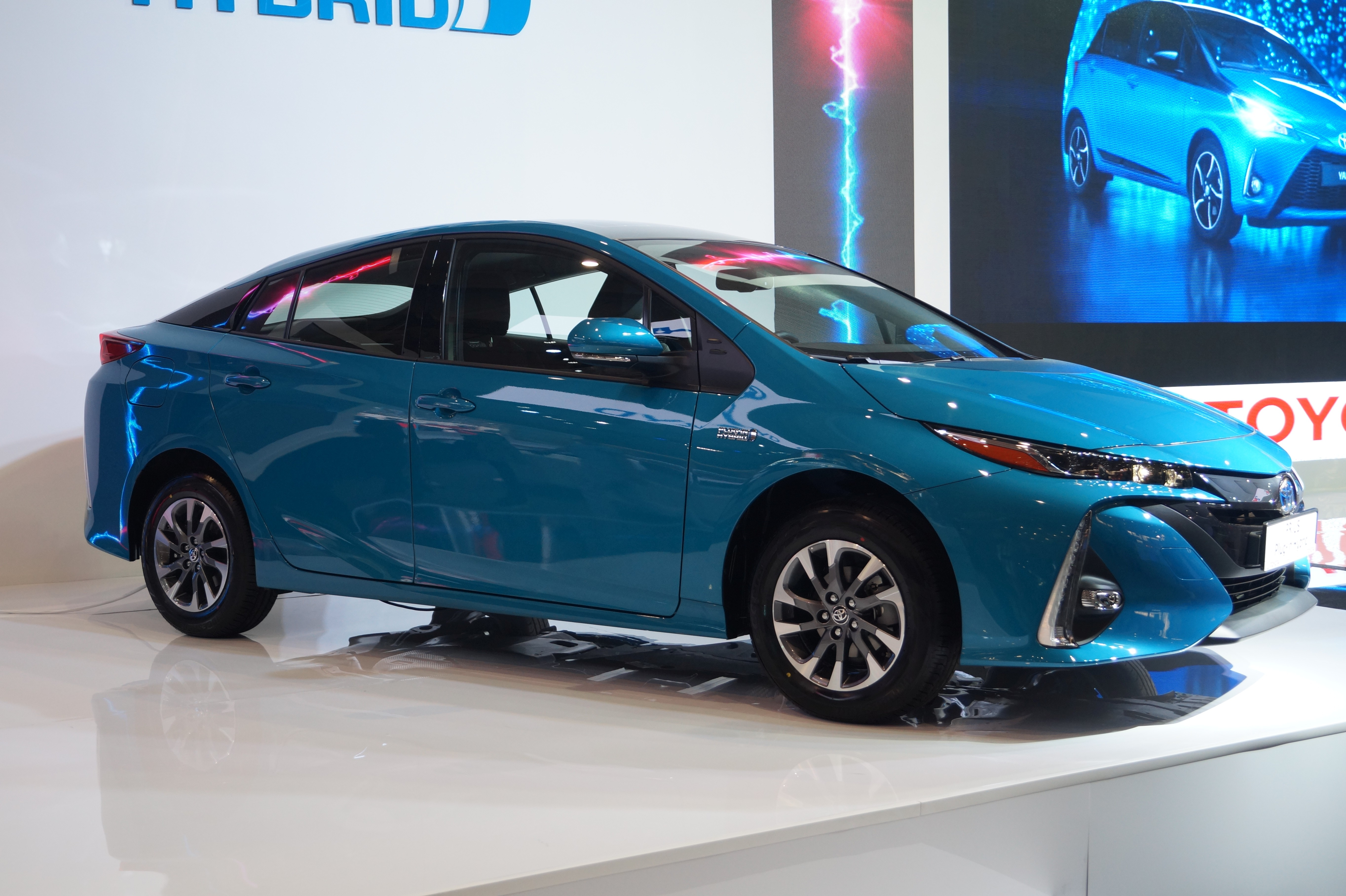 Toyota Prius Plug-in Hybrid na Motor Show Poznań 2017.